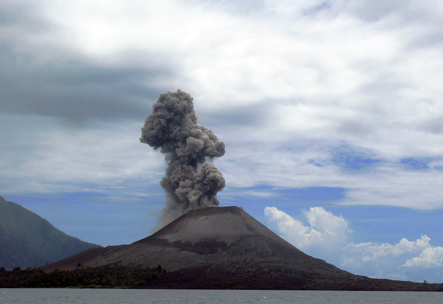 Anak Krakatoa or Anak Krakatau or Anak Krakatao is a volcanic island in the Sunda Strait between Java and Sumatra in Indonesia (